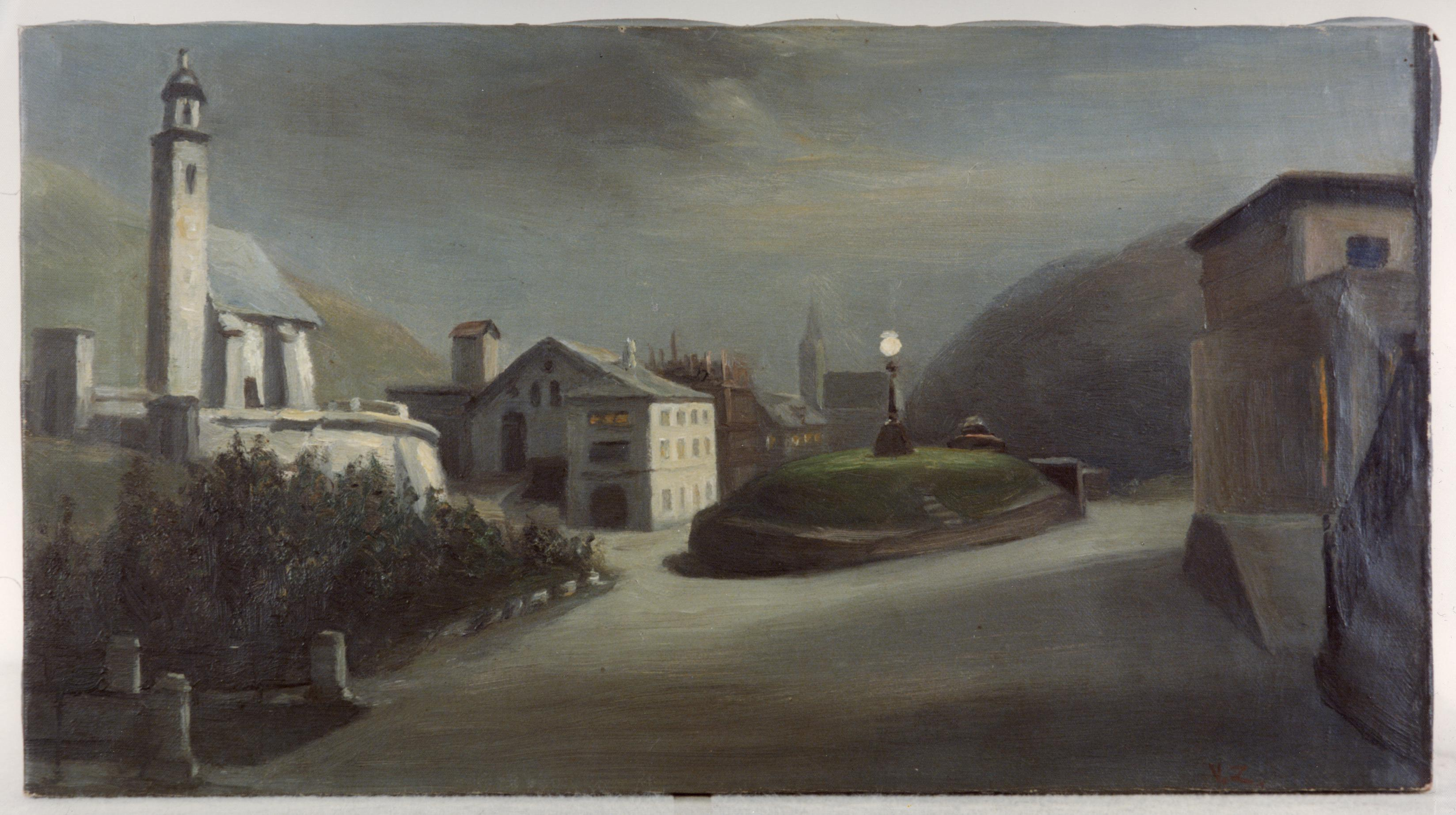 Gemälde: Die Kulm Lampe, die Johannes Badrutt einrichten liess (erste Gleichstrom-Lichtbogen-Lampe der Schweiz). Das erste elektrische Licht auf dem Platz vor dem Kulm Hotel in St. Moritz.